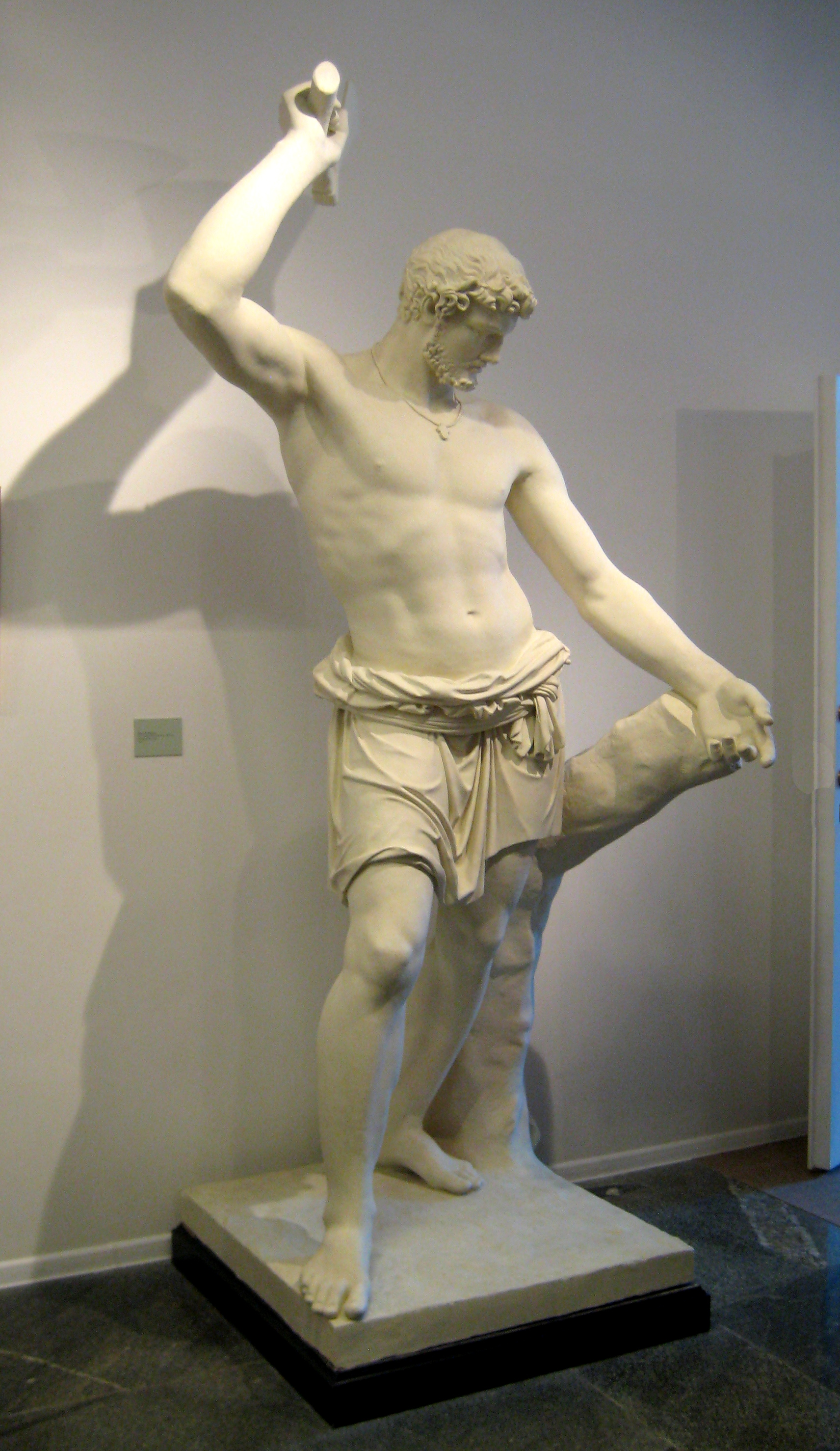 "Русский Сцевола". Скульптор В.И. Демут-Малиновский. 1813 год. Музей "Бородинская панорама". Гипс. Отливка 1961 года